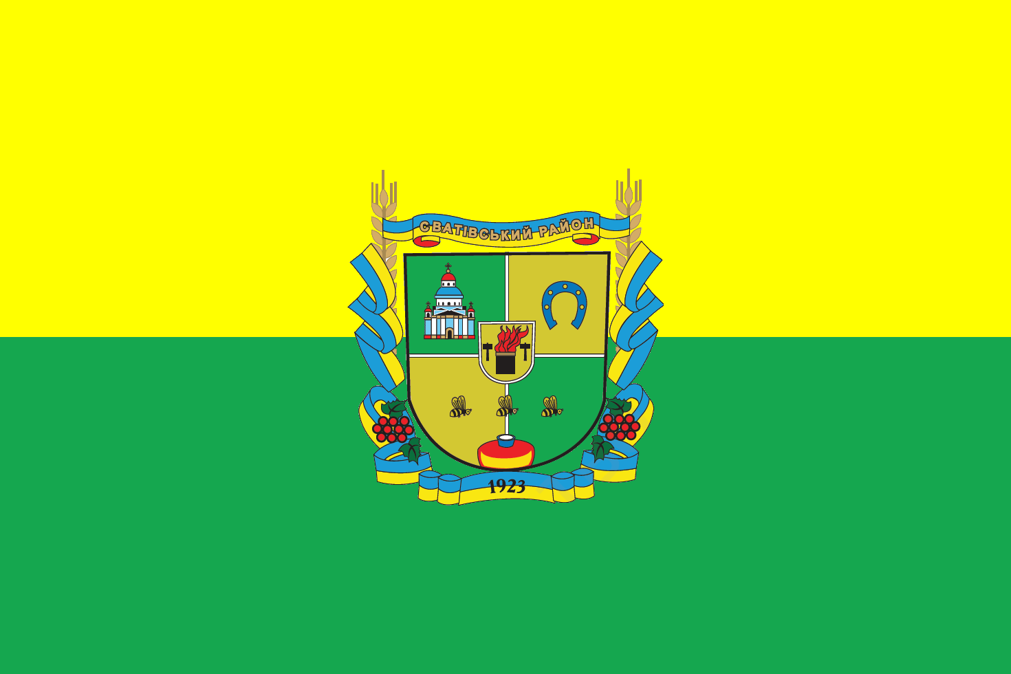 Прапор Сватівського району